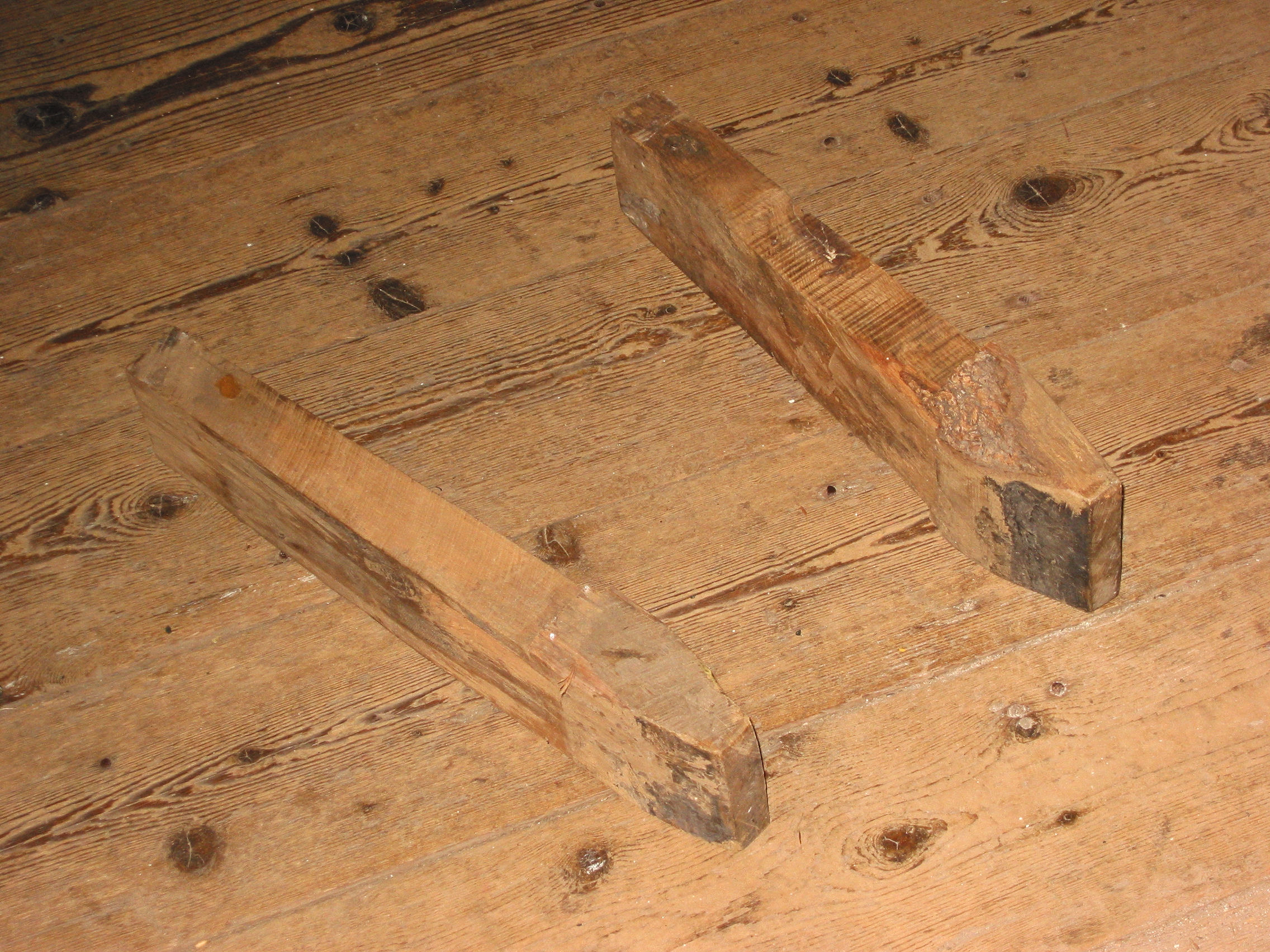 Kammen spoorwiel Walderveensemolen in Walderveen, Gelderland, the Netherlands